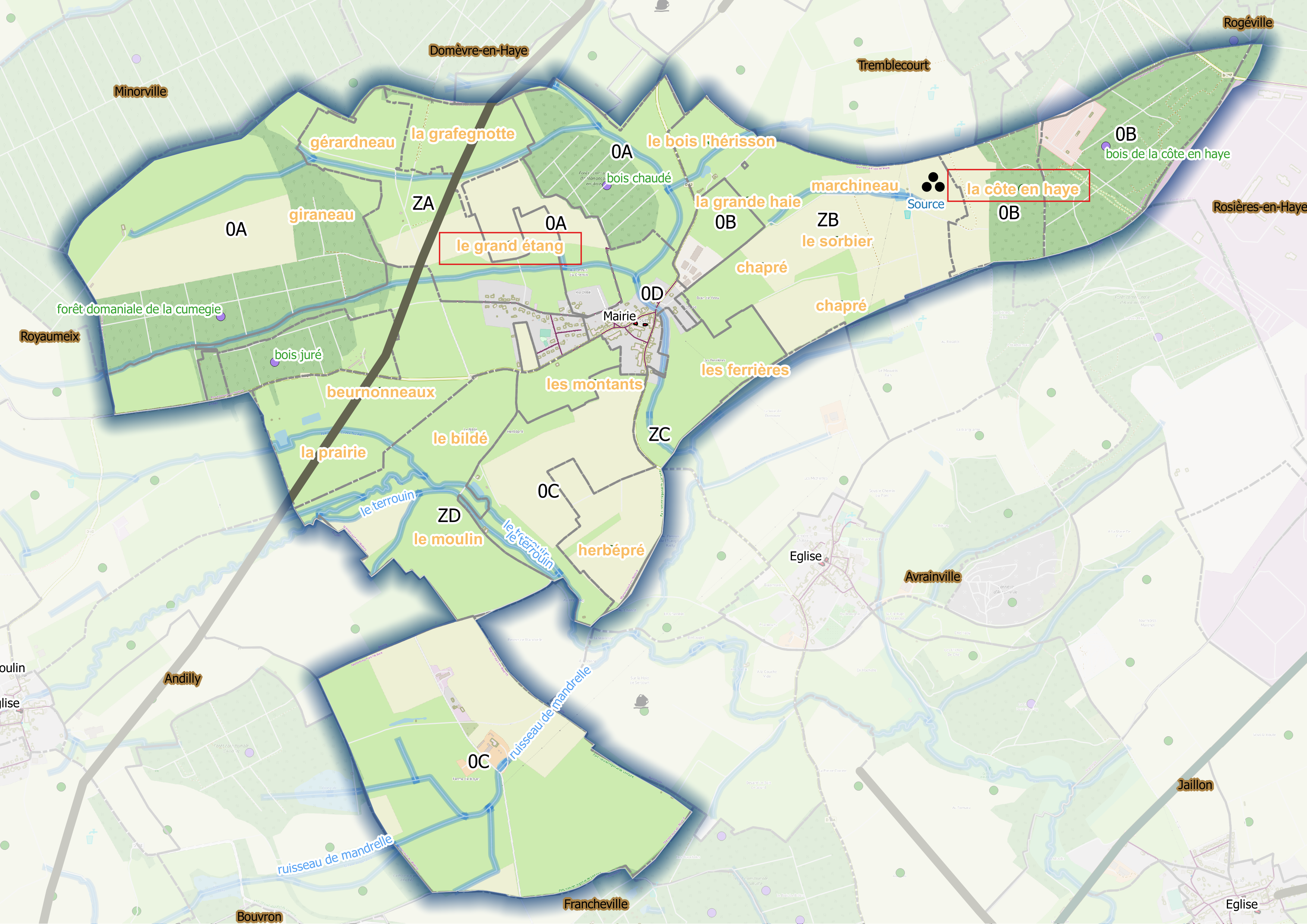 Fig1 - Manoncourt (Ban communal) OSM et Qgis